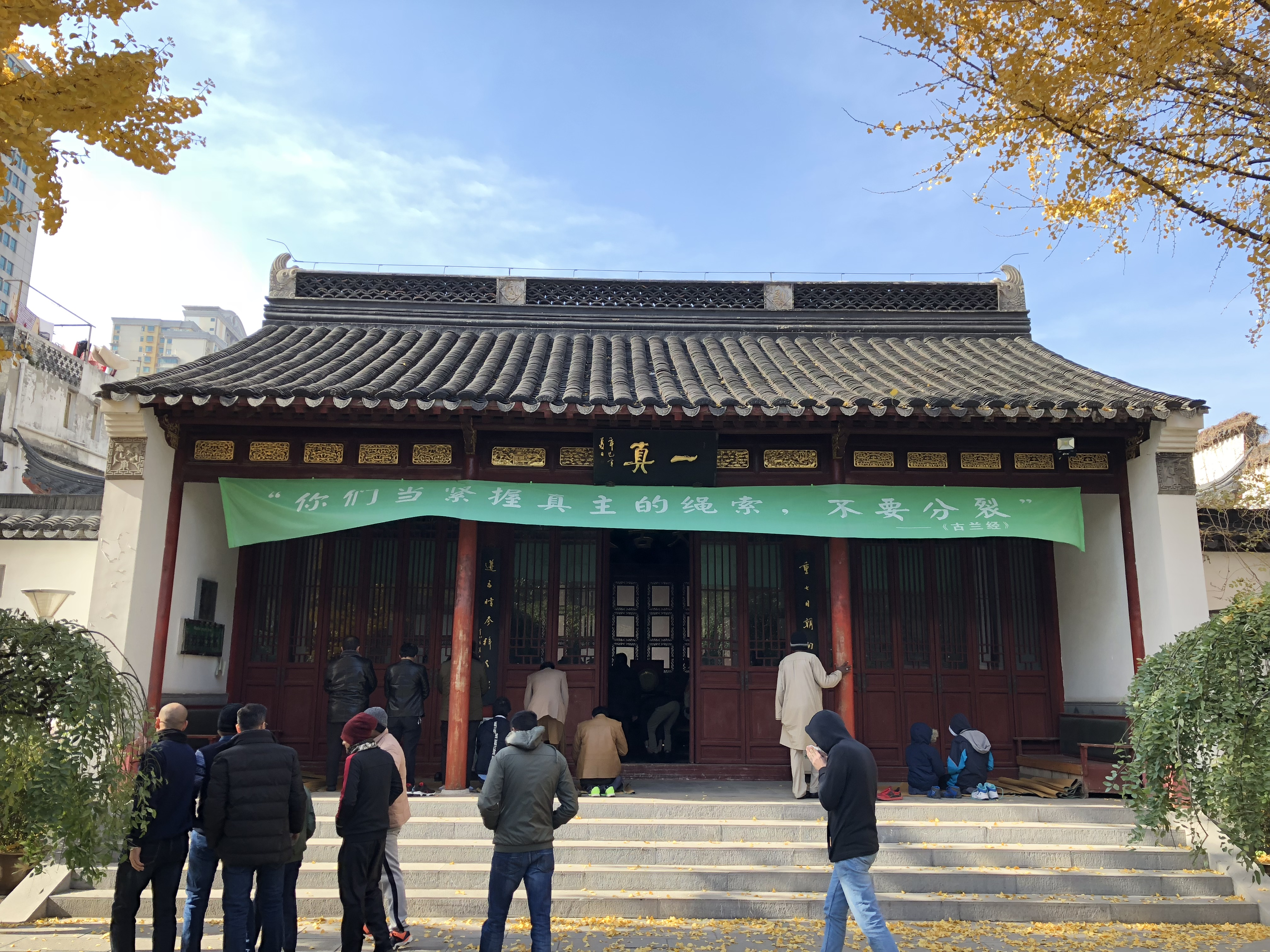 净觉寺 二殿